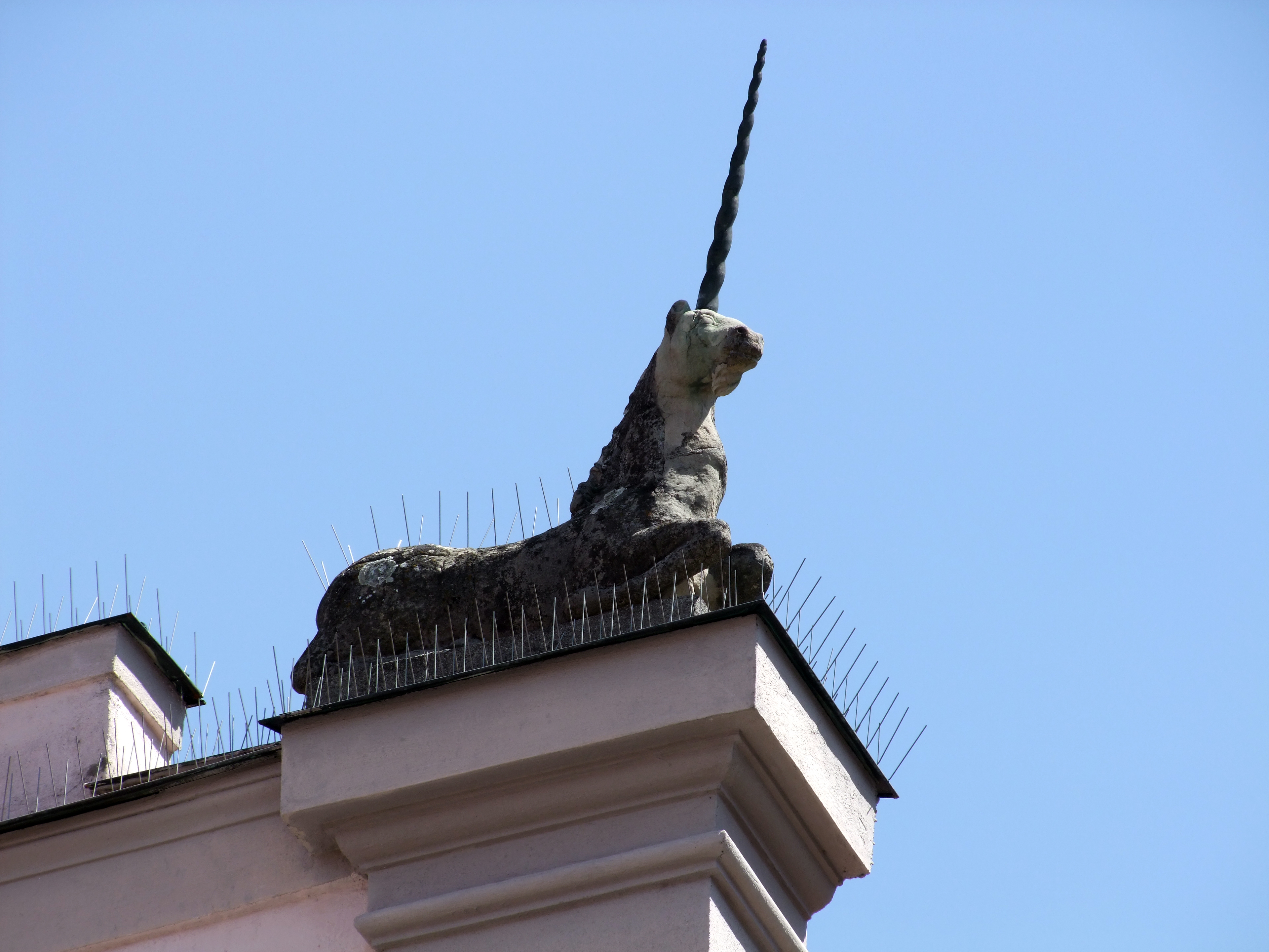 Die Einhornapotheke im oberschwäbischen Memmingen. Die Einhornstatue auf der rechten Giebel